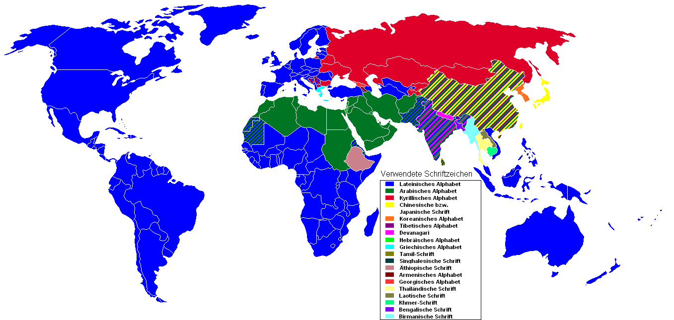 Grobe Übersicht über die auf der Welt verwendeten Alphabete und Schriftzeichen